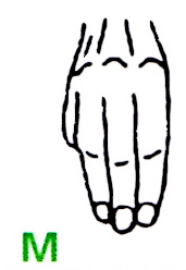 Buchstabe M im deutschen Fingeralphabet, gemäß einer Infokarte des Landesverbandes Bayern der Gehörlosen e.V. (